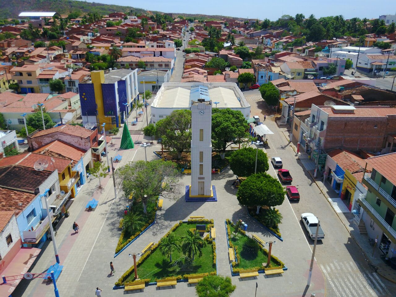 Imagem aérea da praça